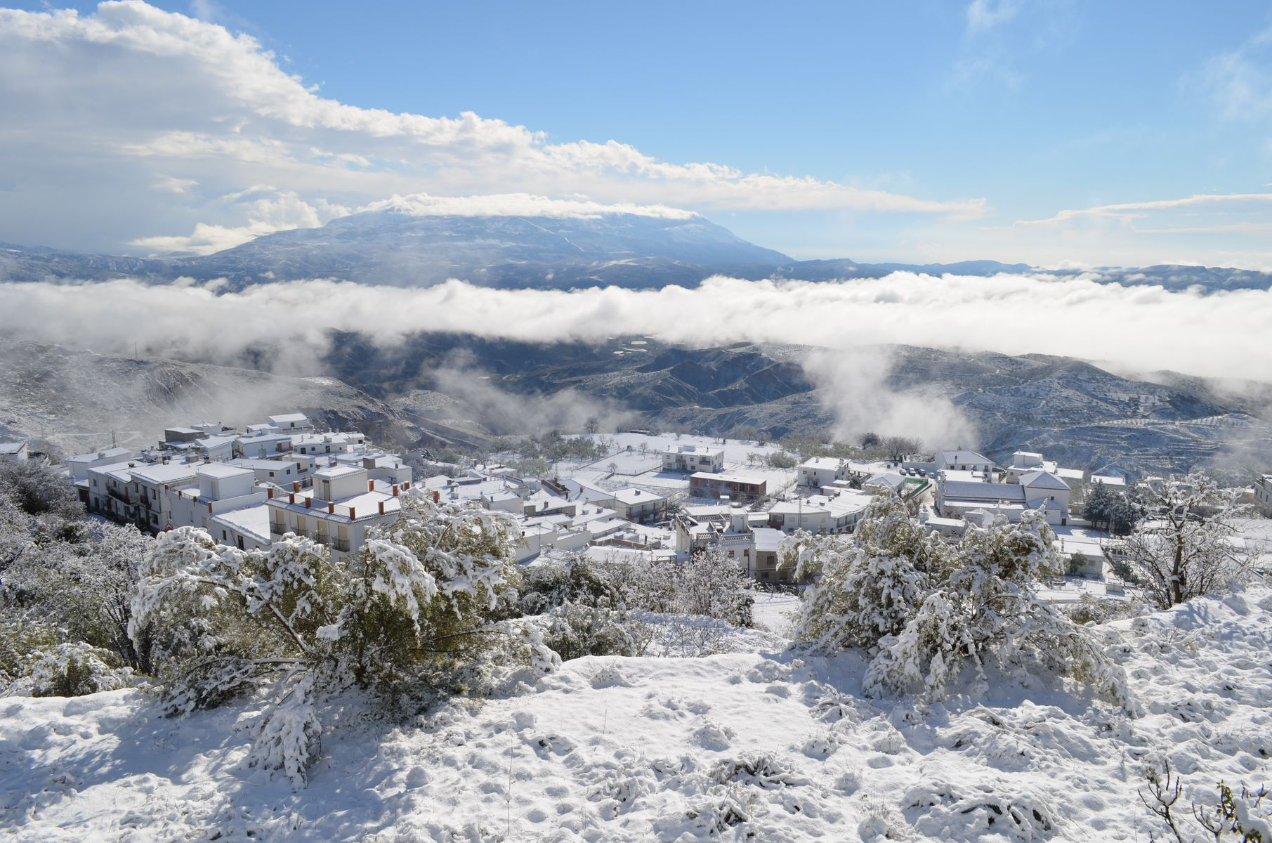 Nieve en febrero 2013